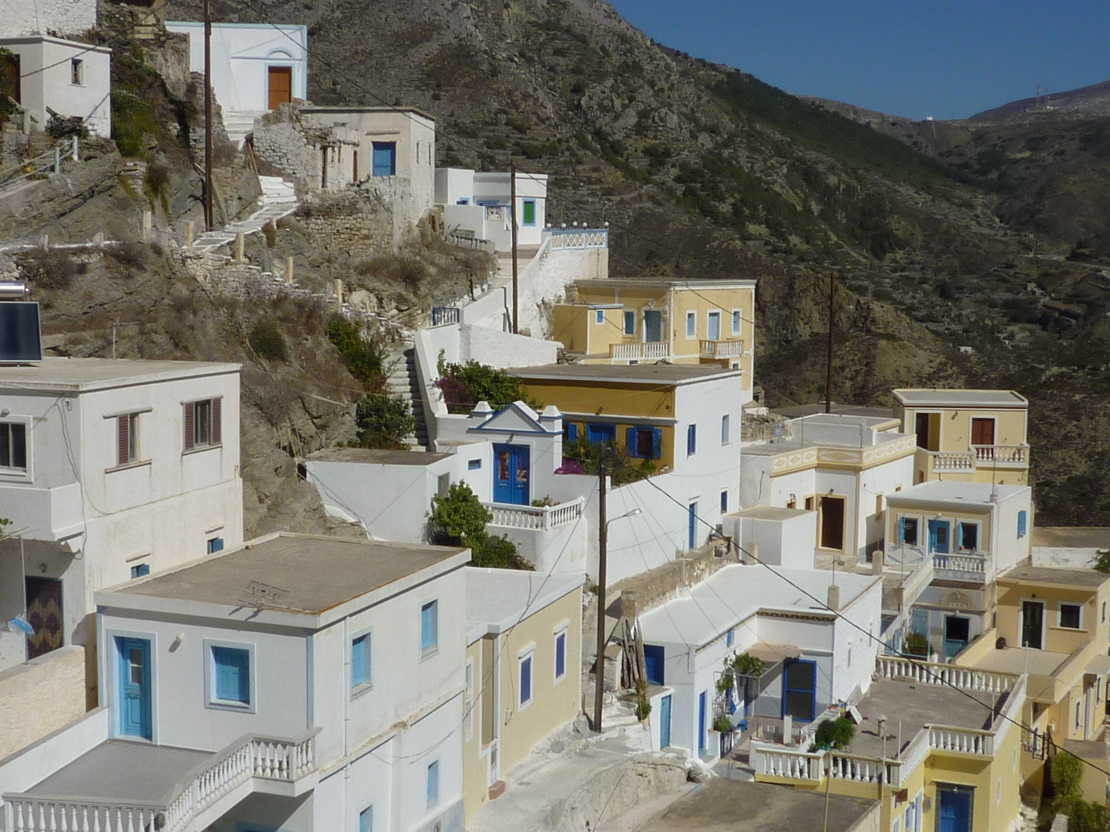 Bergdorf Olymbos im Norden von Karpathos, Griechenland